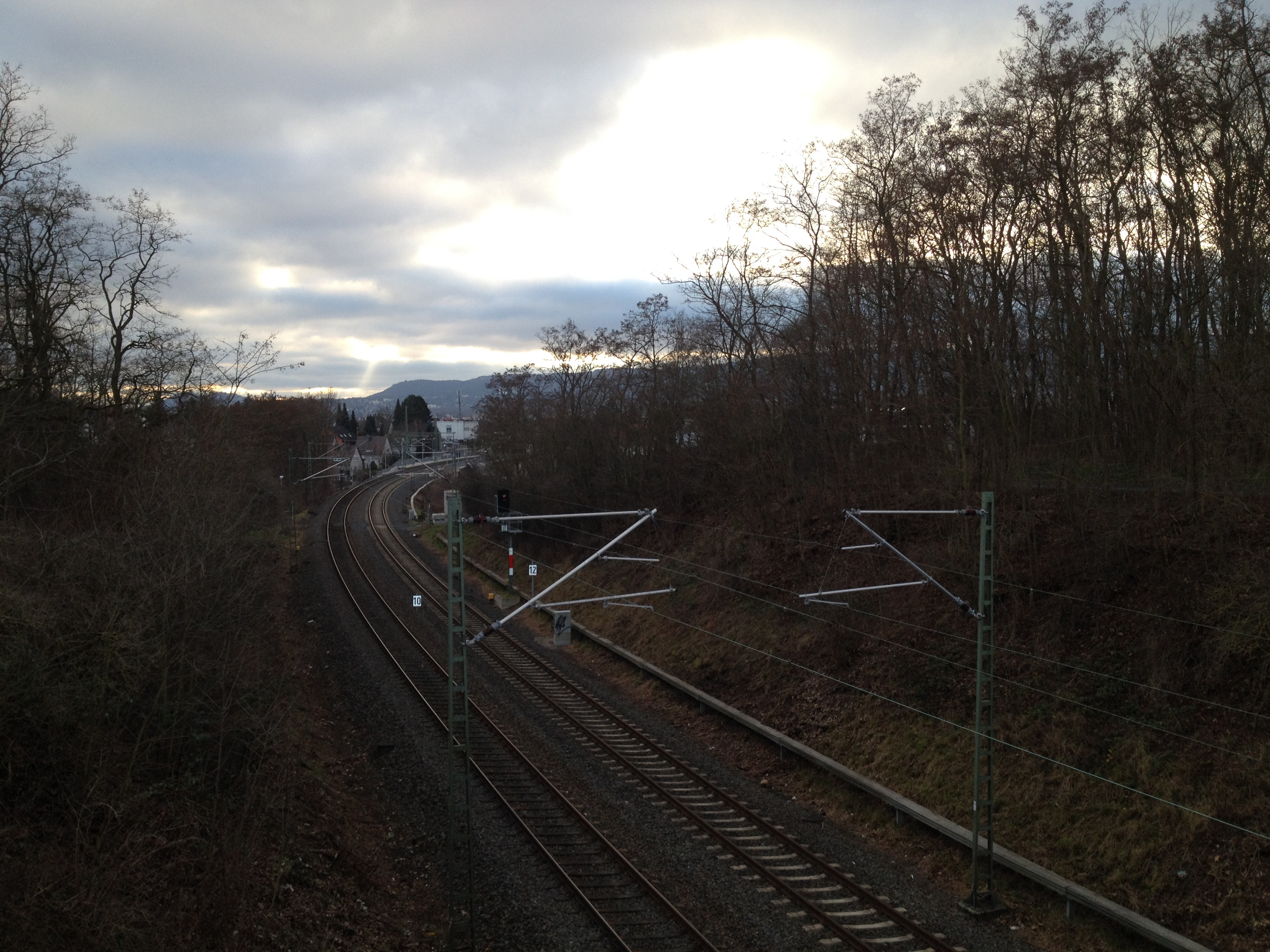 Blick von der neuen Brücke auf die ehemalige Schranke am Kiefernweg